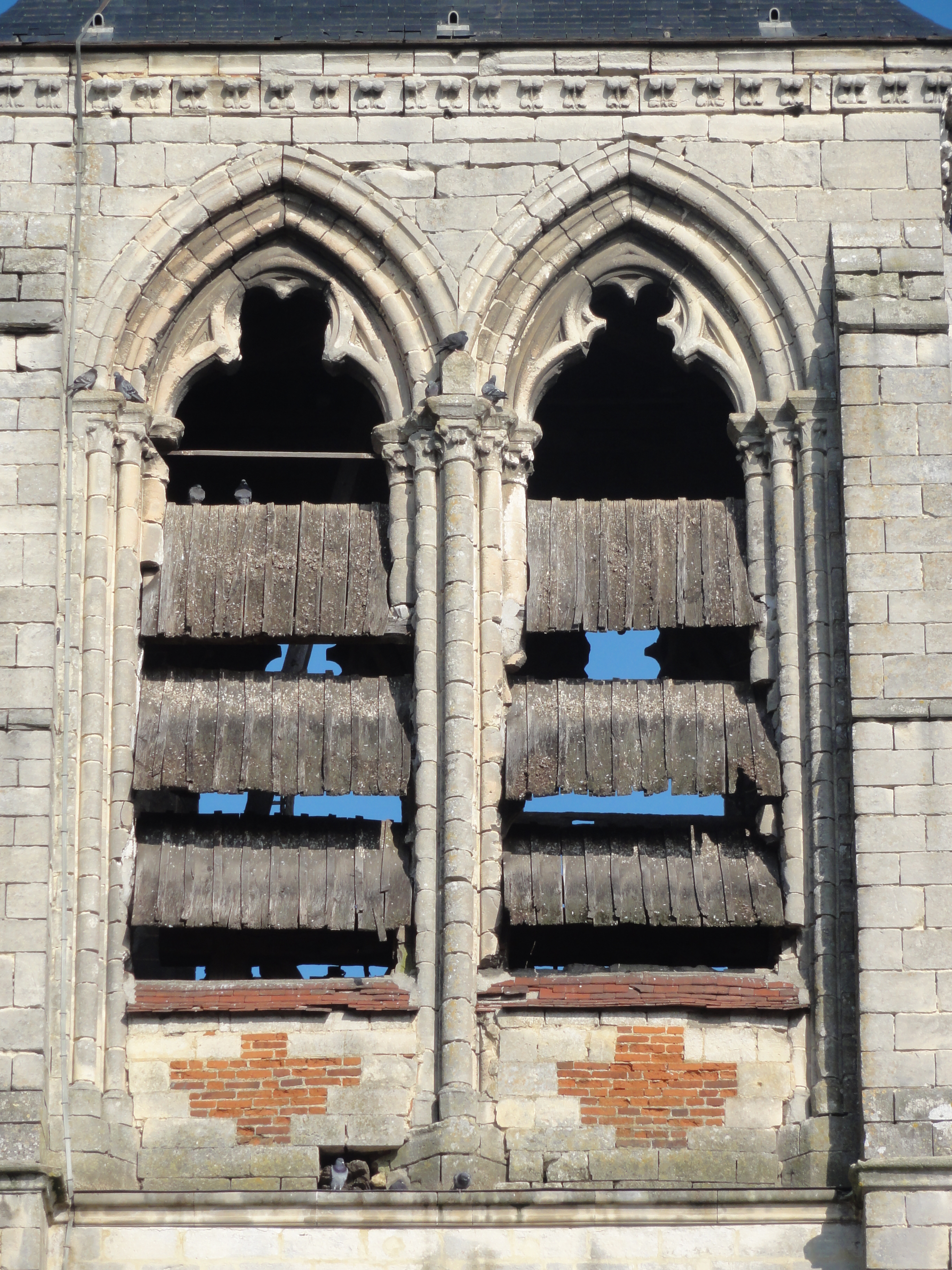 Église Saint-Martin de Bailleval - voir titre.